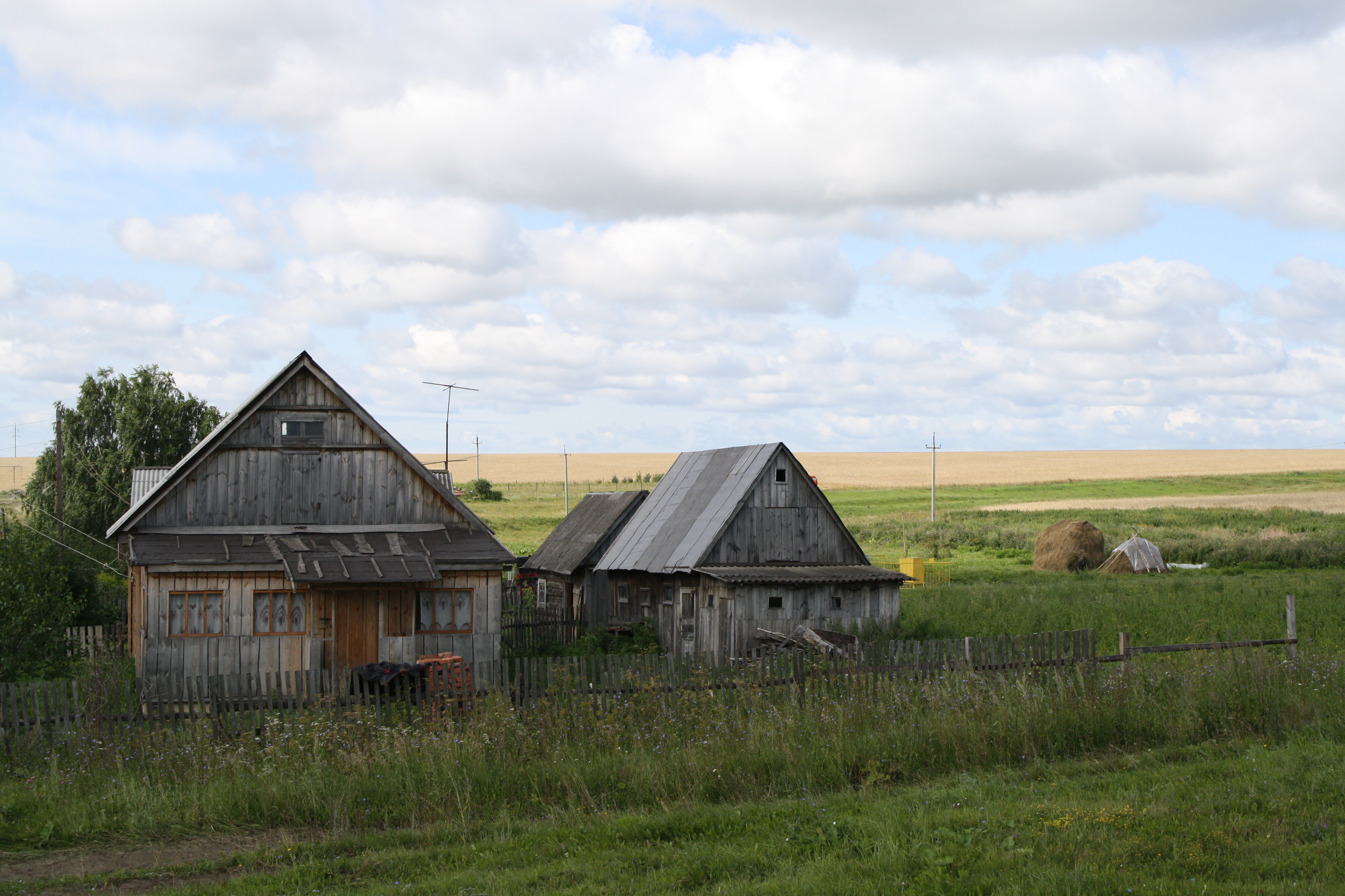 Village. Penza reg. Russia. Деревня. Пензенская обл. Россия